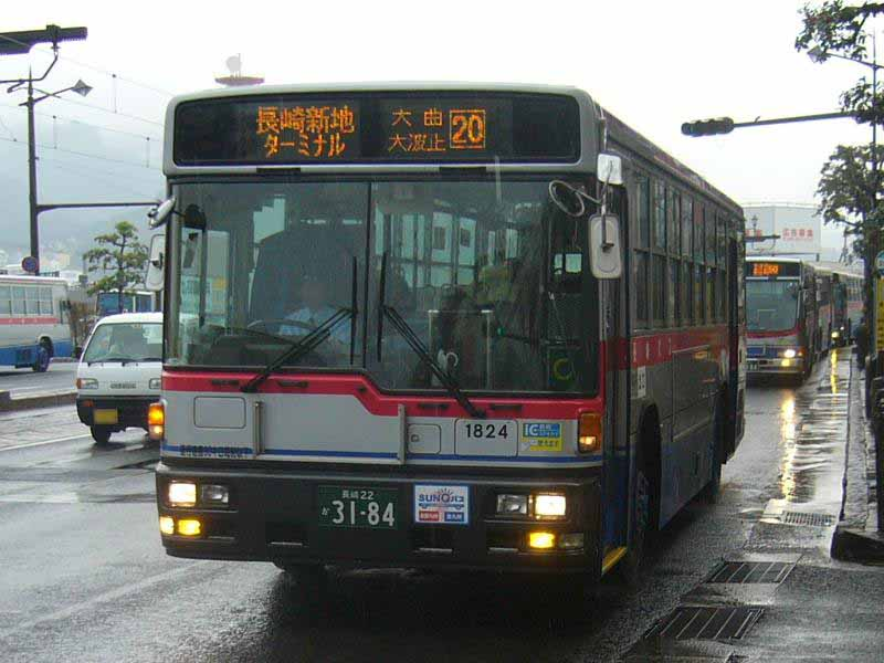 登録番号：長崎22か31-84 長崎自動車松ヶ枝営業所所属